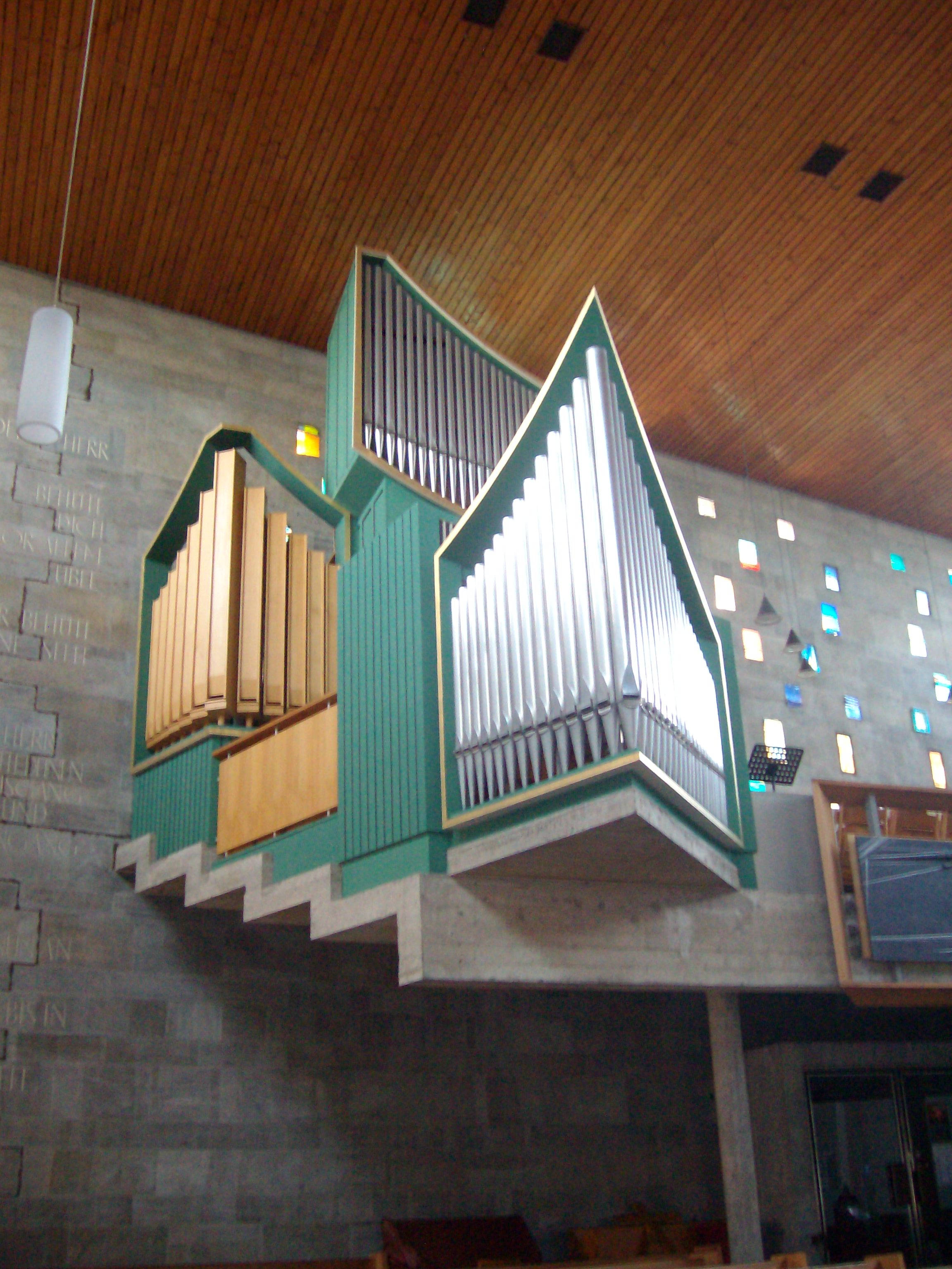 Orgel der Petruskirche Gießen, Hessen